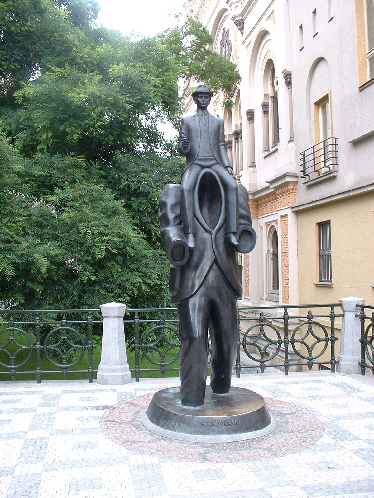 Kafka-Denkmal von Jaroslav Róna